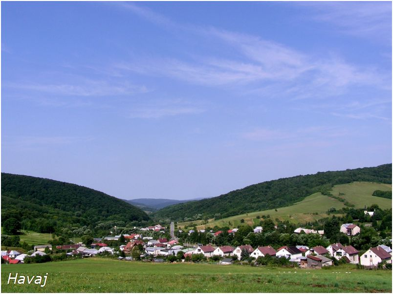 Celkový pohľad